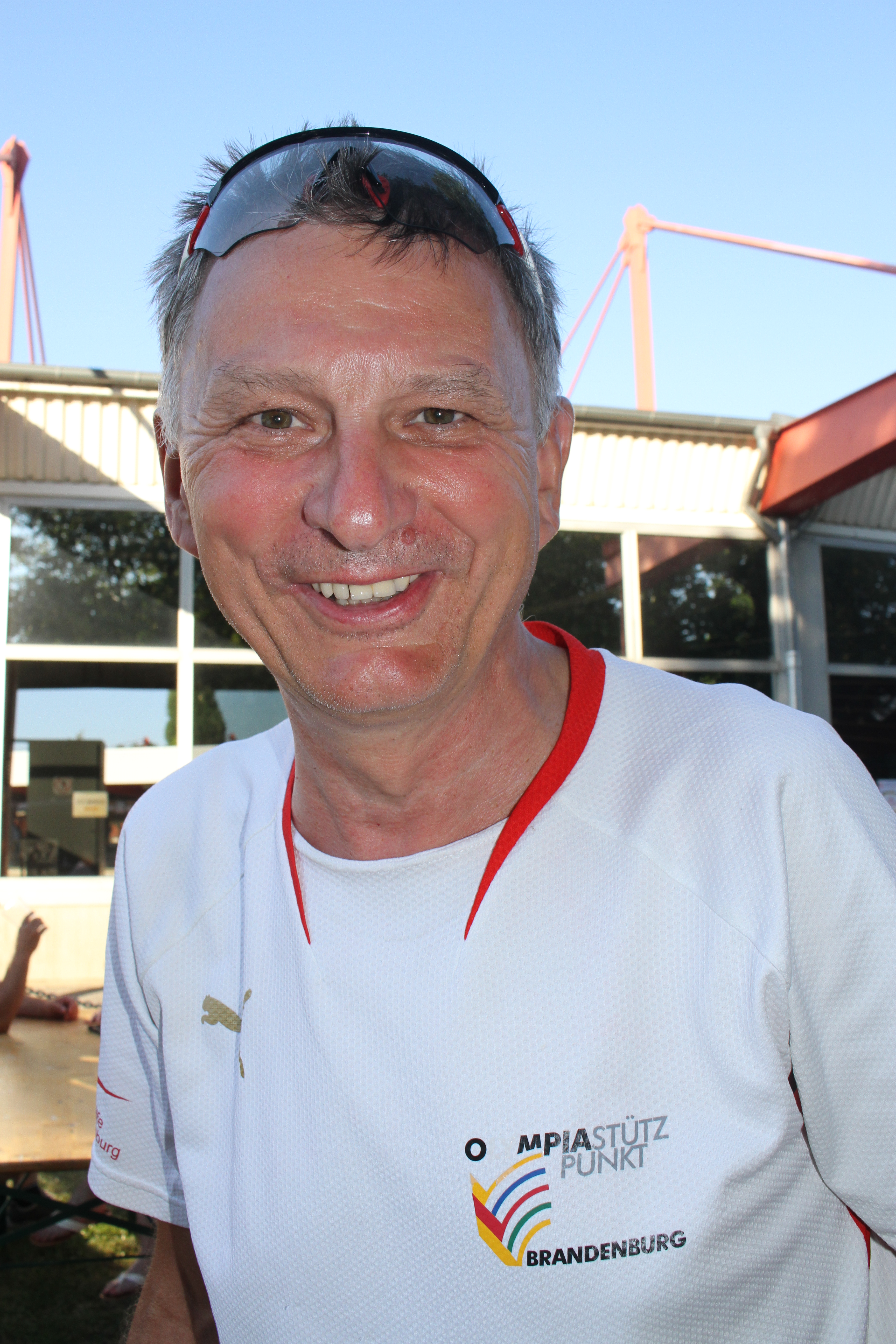 Bernd Drogan, deutscher Radsportler und -trainer